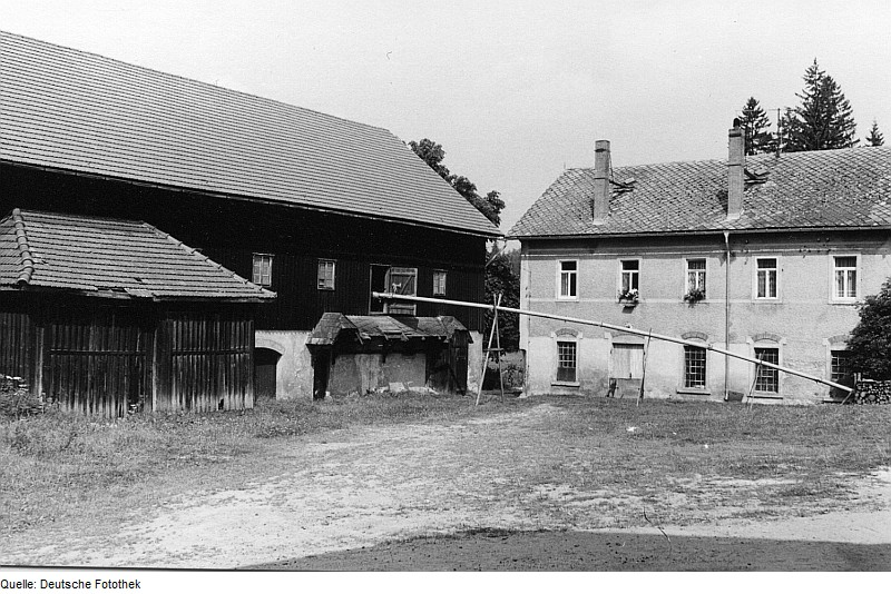 Original image description from the Deutsche Fotothek Schmiedeberg-Ammelsdorf. Körnermühle